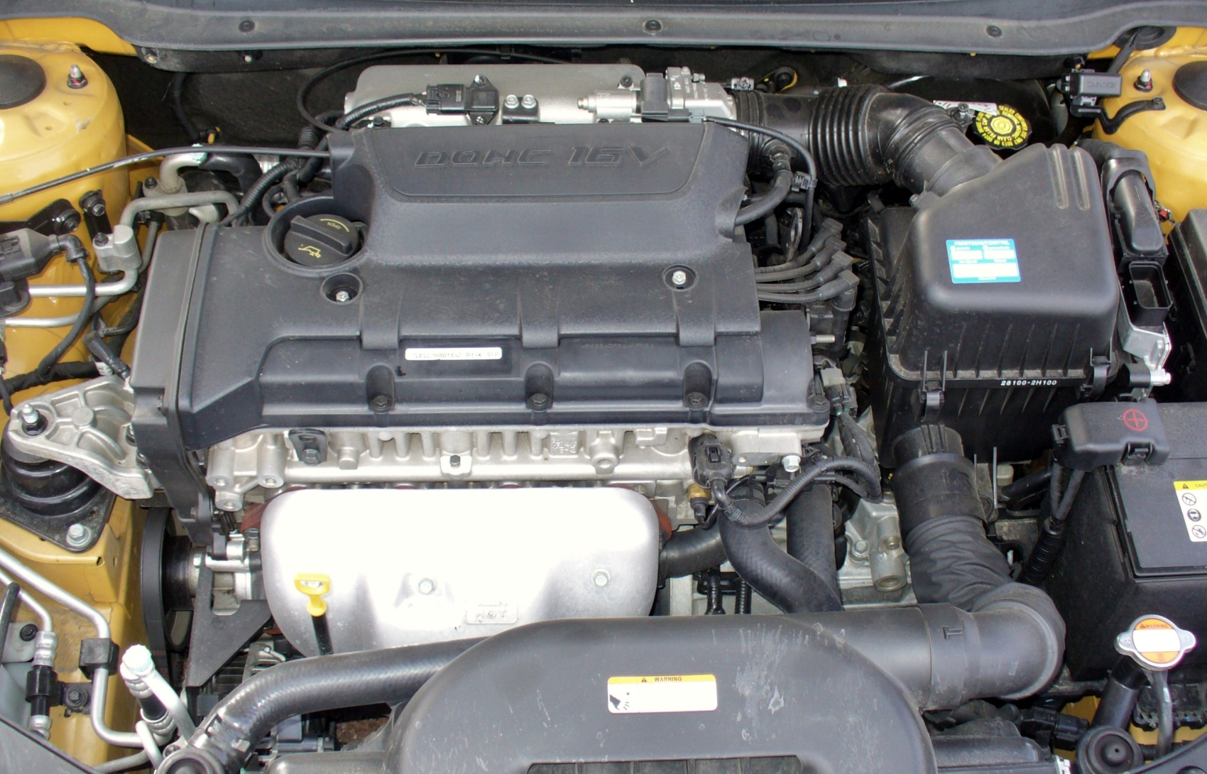 Kia pro_cee'd 2.0 CVVT